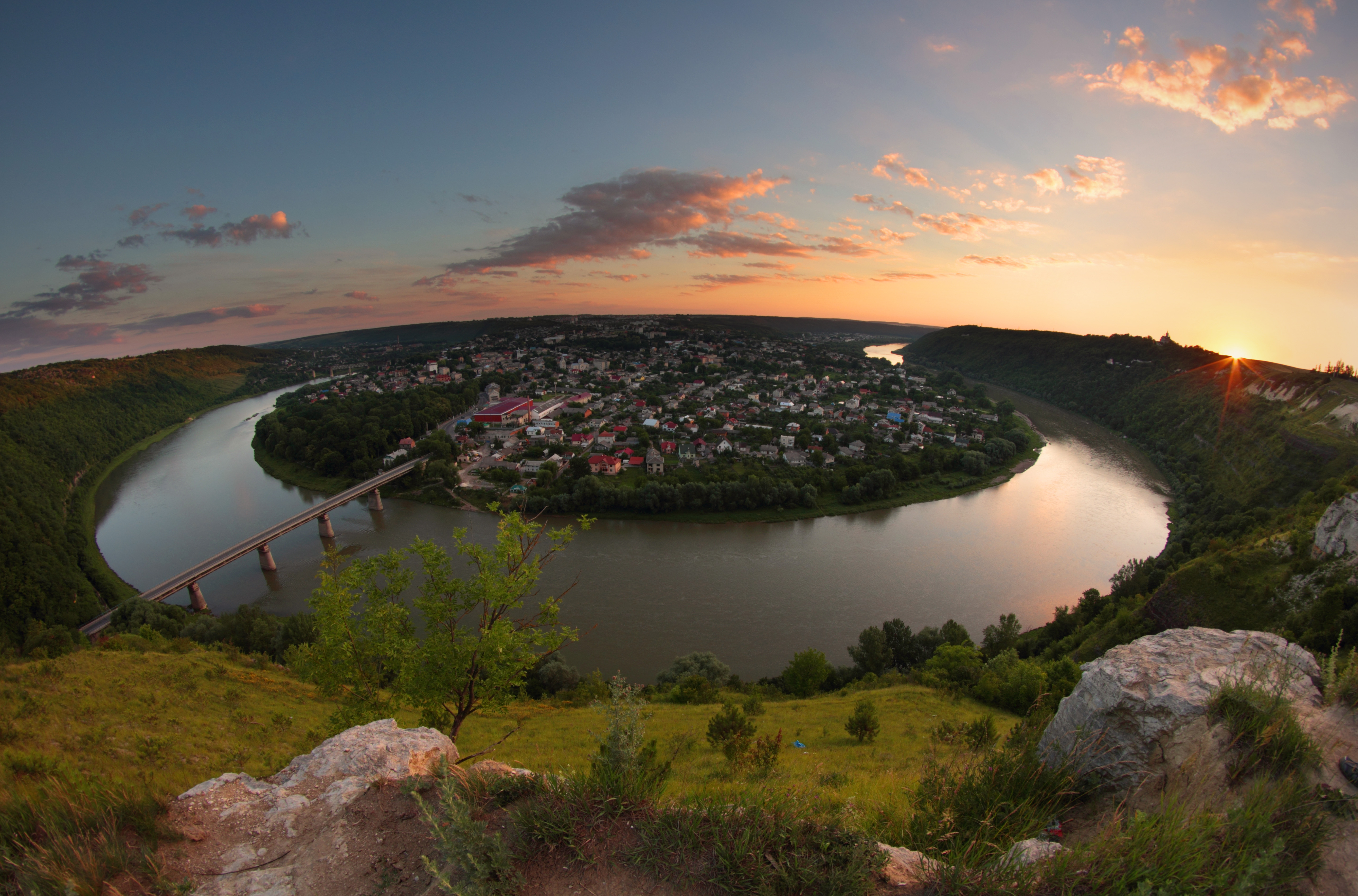 «Дністровський каньйон» поблизу Заліщиків.